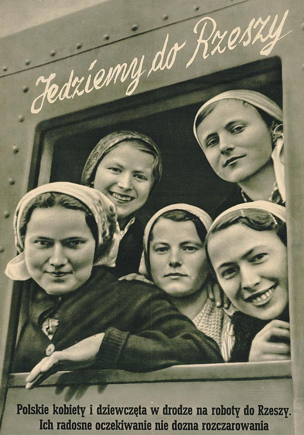 Niemiecki plakat propagandowy z okresu II wojny światowej nakłaniający Polki do wyjazdu do Rzeszy. Polskie kobiety i dziewczęta w drodze na roboty do Rzeszy. Ich radosne oczekiwanie nie dozna rozczarowania